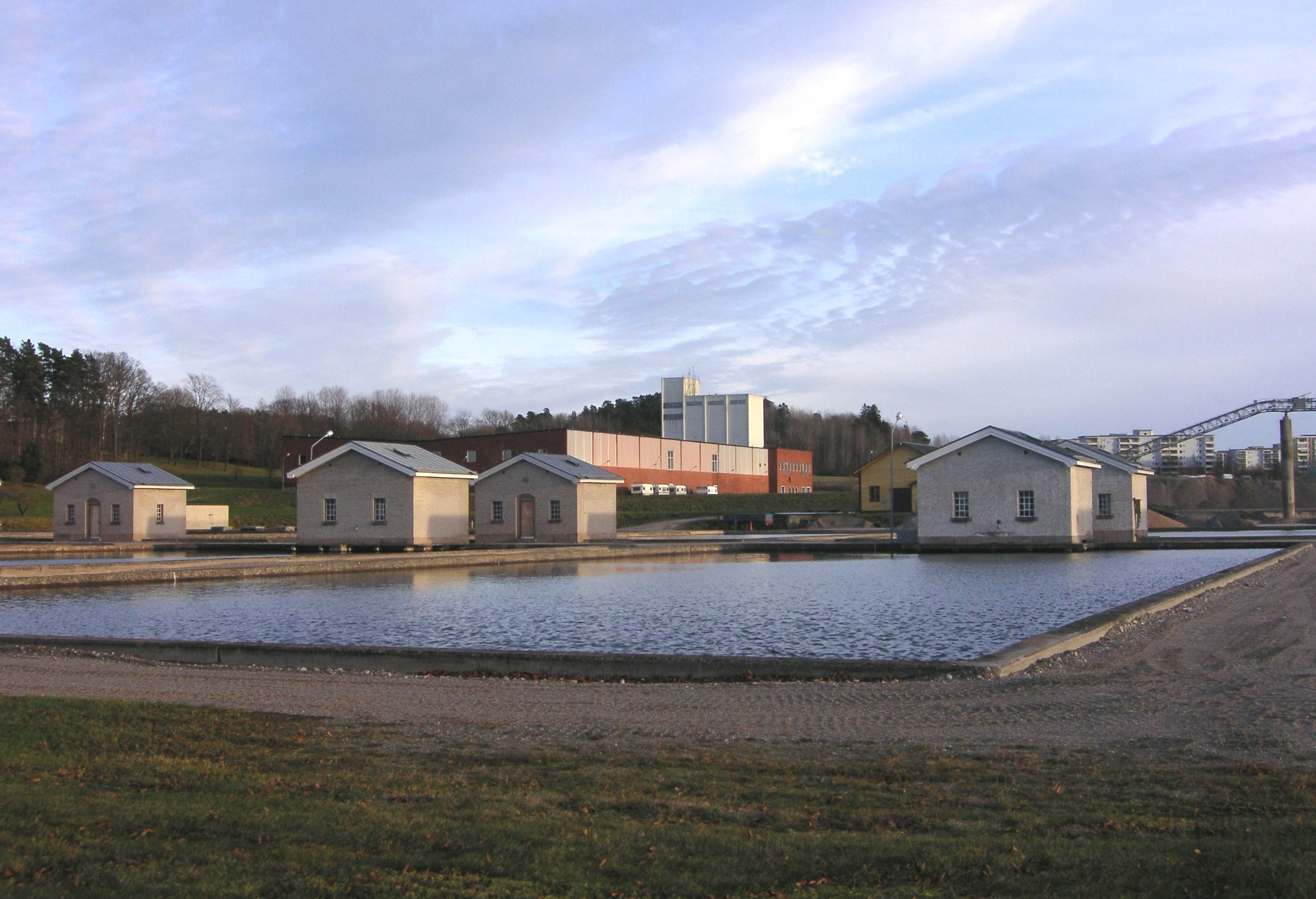 Norsborgs vattenverk, långsamfilter och Östra verket i bakgrunden